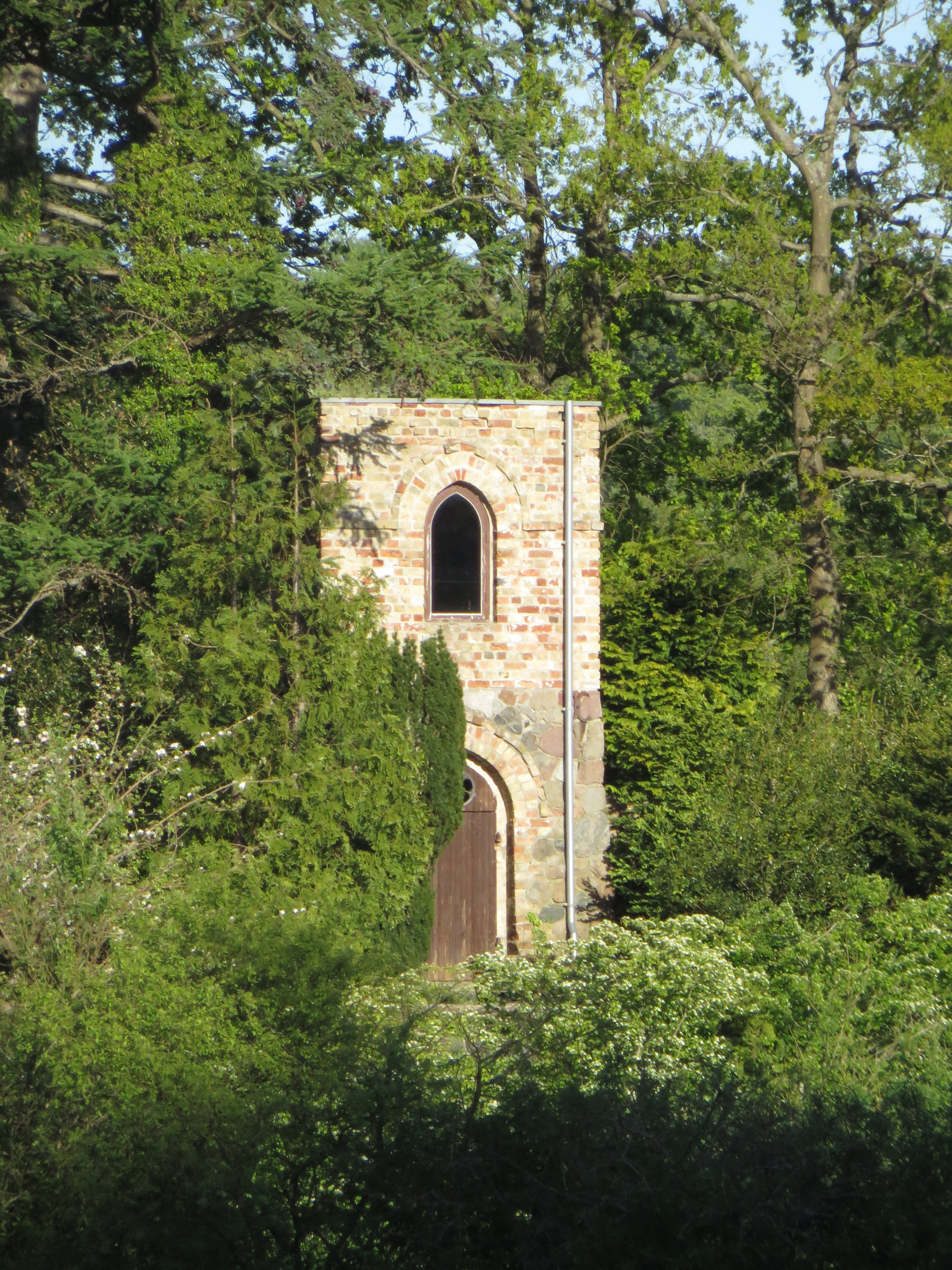 Ruine Erlkron, Glücksburg, 22 Mai 2015, Bild 05